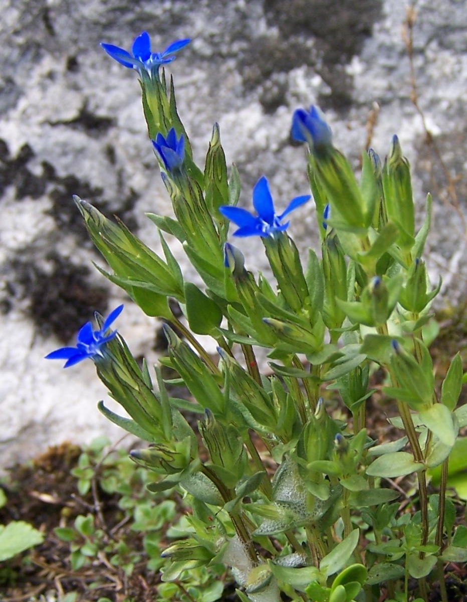 Gentiana nivalis (pl. goryczka śniegowa), habitat: West Tatra Mountains, Hala Upłaz, Skała Piec